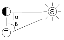 Imagen de creación propia